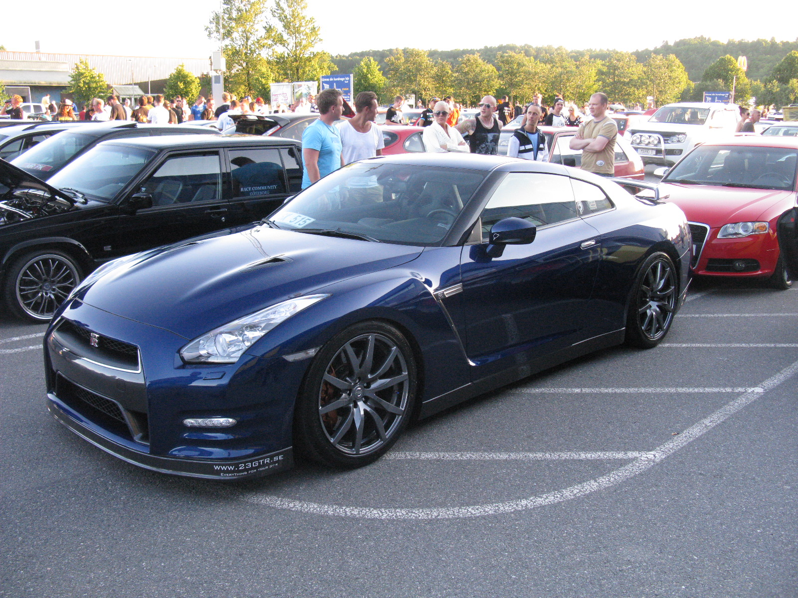 Nissan GT-R